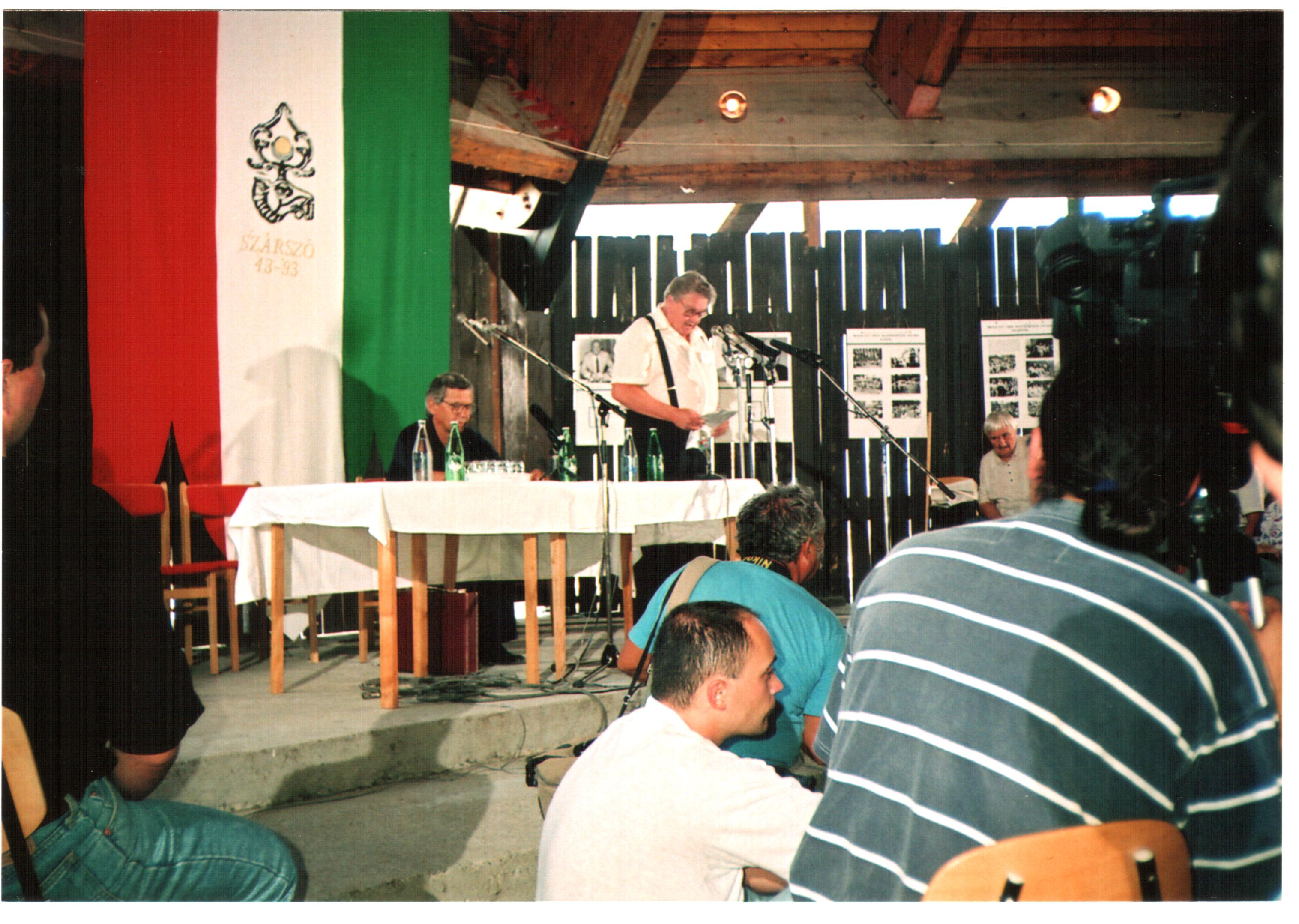 Csurka István, Kósa Ferenc. A felvétel 1993. augusztus hó 24- én készült Balatonszárszón. Püski Sándor az 1943 –as Szárszói Magyar Élet Konferencia 50. évfordulójának tiszteletére szervezte a találkozót. A találkozón jelen voltak: Püski Sándor, Csurka István (21,22,23, Bíró Zoltán (13), Szűrös Mátyás 28), Jobbágyi Gábor, Surján László (29), Tábori László (32), Bégány Attila (32, 37), Elekes Andor (5,6,8,35), Füzessy Tibor (14), 1943. augusztus. 23.-28 –a között Püski Sándor Magyar Élet találkozót szervezett nemzeti kérdések megvitatására a Soli Deo Gloria balatonszárszói üdülőjében. Diákok, írók, politikusok, hírlapírók, egyesületi vezetők, munkás- és parasztfiatalok egyaránt a résztvevők között voltak. A vitákban részt vettek a KALOT, az EMSZO és a Hivatásszervezet tagjai is. A megbeszélések témája az 1939 óta tartó világháború., a magyar. nép állapota és a magyar nemzet háború utáni jövője. Az ismertebb előadók és fölszólalók: Németh László (1901-75), Kodolányi János (1899-1969), Veres Péter (1897-1970), Erdei Ferenc (1910-71), Karácsony Sándor (1891-1952), Féja Géza (1900-78), László Gyula (1910-98), Szabó Pál (1893-1970), Jócsik Lajos (1910-80), Nagy István (1904-77), Szabédi László (1907-59). A legelevenebb érdeklődést Erdei Ferenc és Németh László vitája váltotta ki. Erdei az esélyek alakulásából már kirajzolódni látszó 'szocializmus', utóbbi a kapitalizmus és a szocializmus közötti 'harmadik út' mellett érvelt. A résztvevők döntő többsége az utóbbival rokonszenvezett. Források: Szárszó '93 Az 1993 évi szárszói tábor előadás és megbeszéléssorozata Püski, Budapest, 1993 Borbándi Gyula: A magyar népi mozgalom. New York, 1983. (és Bp., 1989:336.) - Szárszó 1943. Budapest, 1983. - Püski Sándor: Könyves sors - magyar sors. Budapest, 2002. Őrző a strázsán Somodi István: Szárszó – Modell vagy emlék?